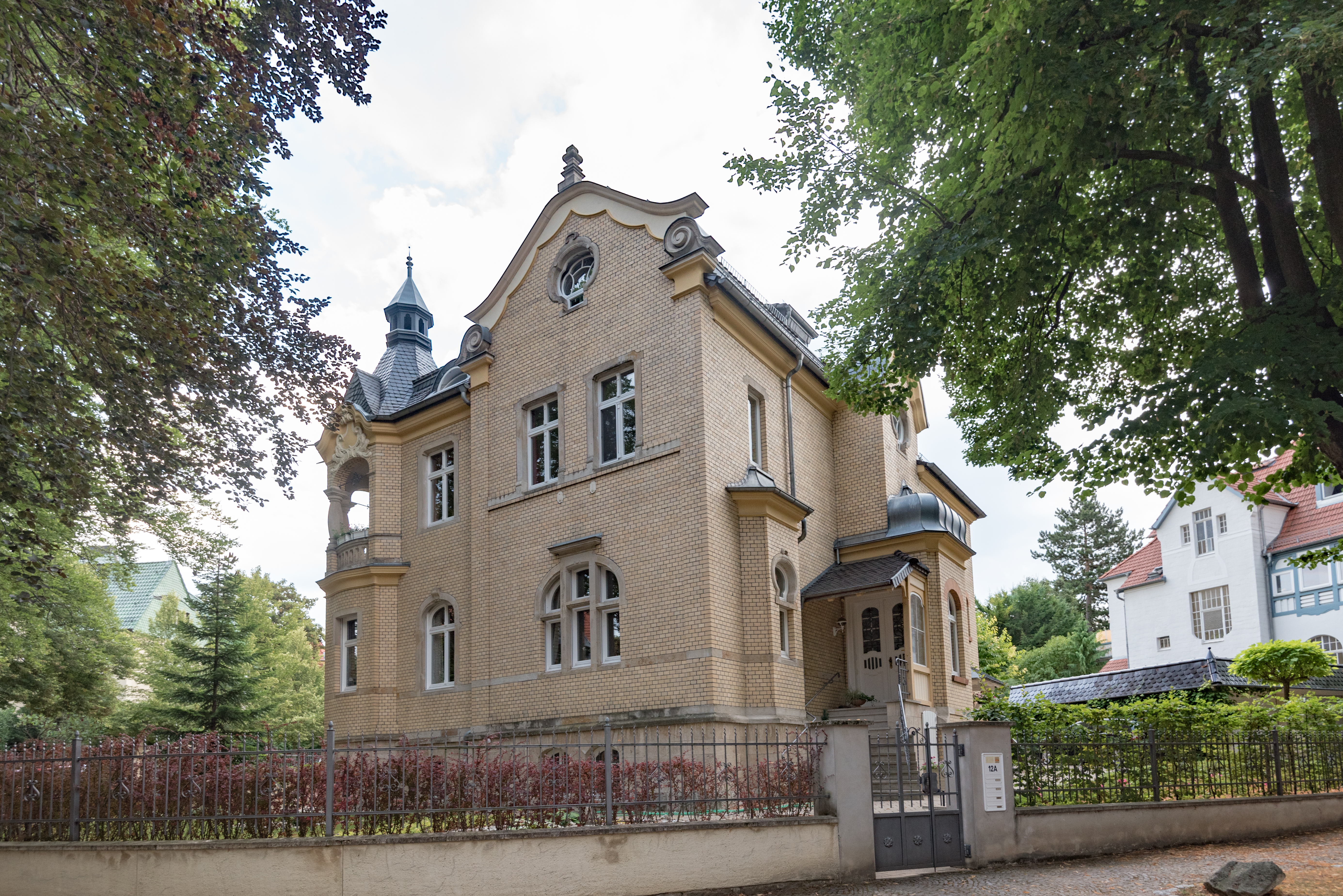 Naumburg (Saale), Buchholzstraße 12a